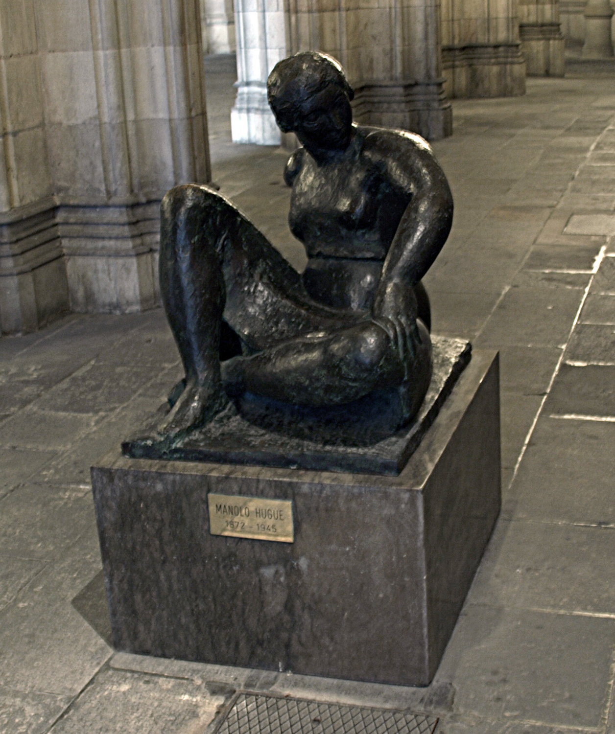 "Mujer sentada", de Monolo Hugué (Ayuntamiento de Barcelona)